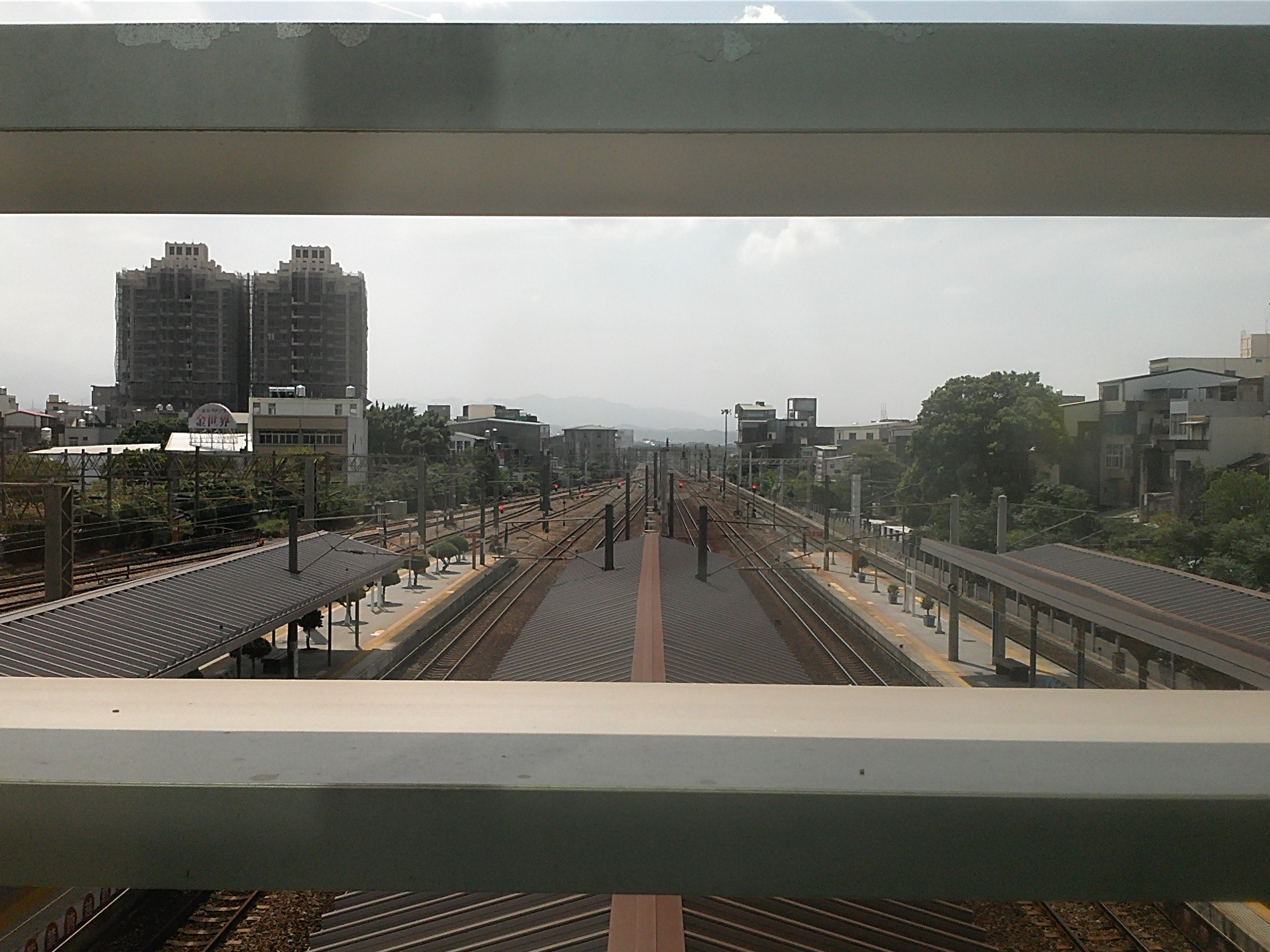 臺灣鐵路管理局竹南車站北上軌道俯瞰圖